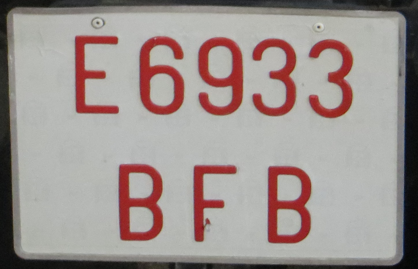 Spaan kentekenplaat voor langzame voertuigen